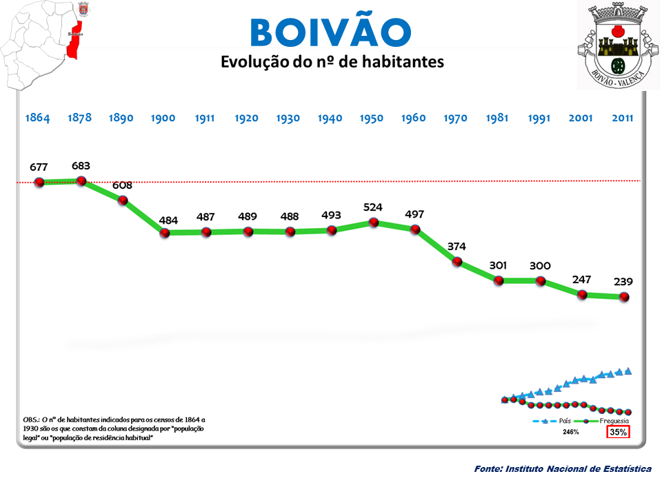 Censos 1864/2011